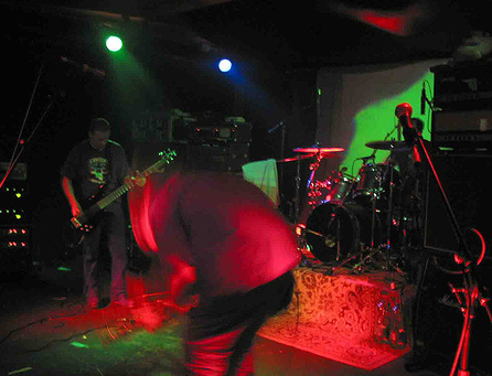 Jesu, 03.05.05 Sputnikhalle, Münster